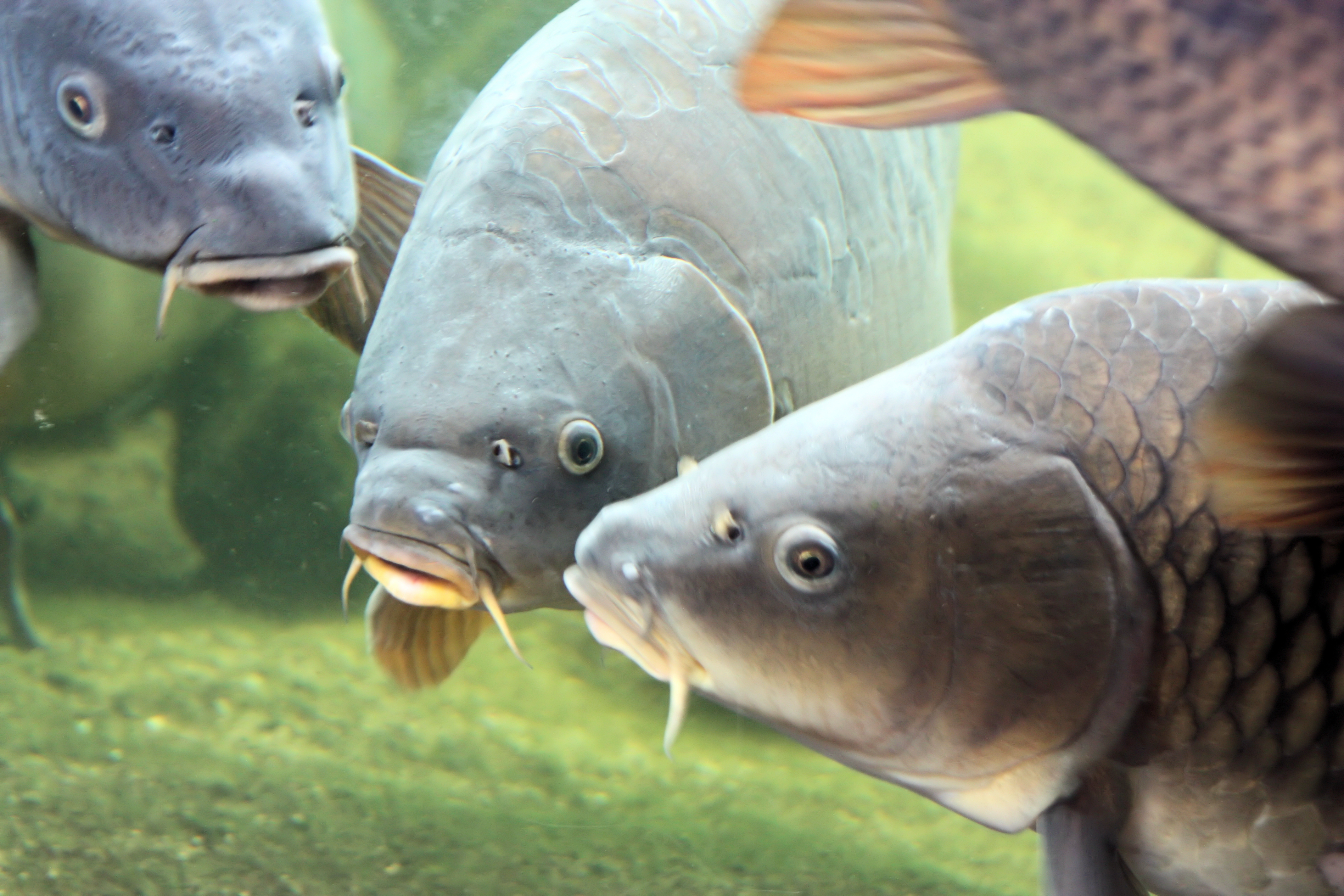 Mehrere Karpfen (Spiegelkarpfen, Graskarpfen, Cyprinus carpio, Cyprinidae)